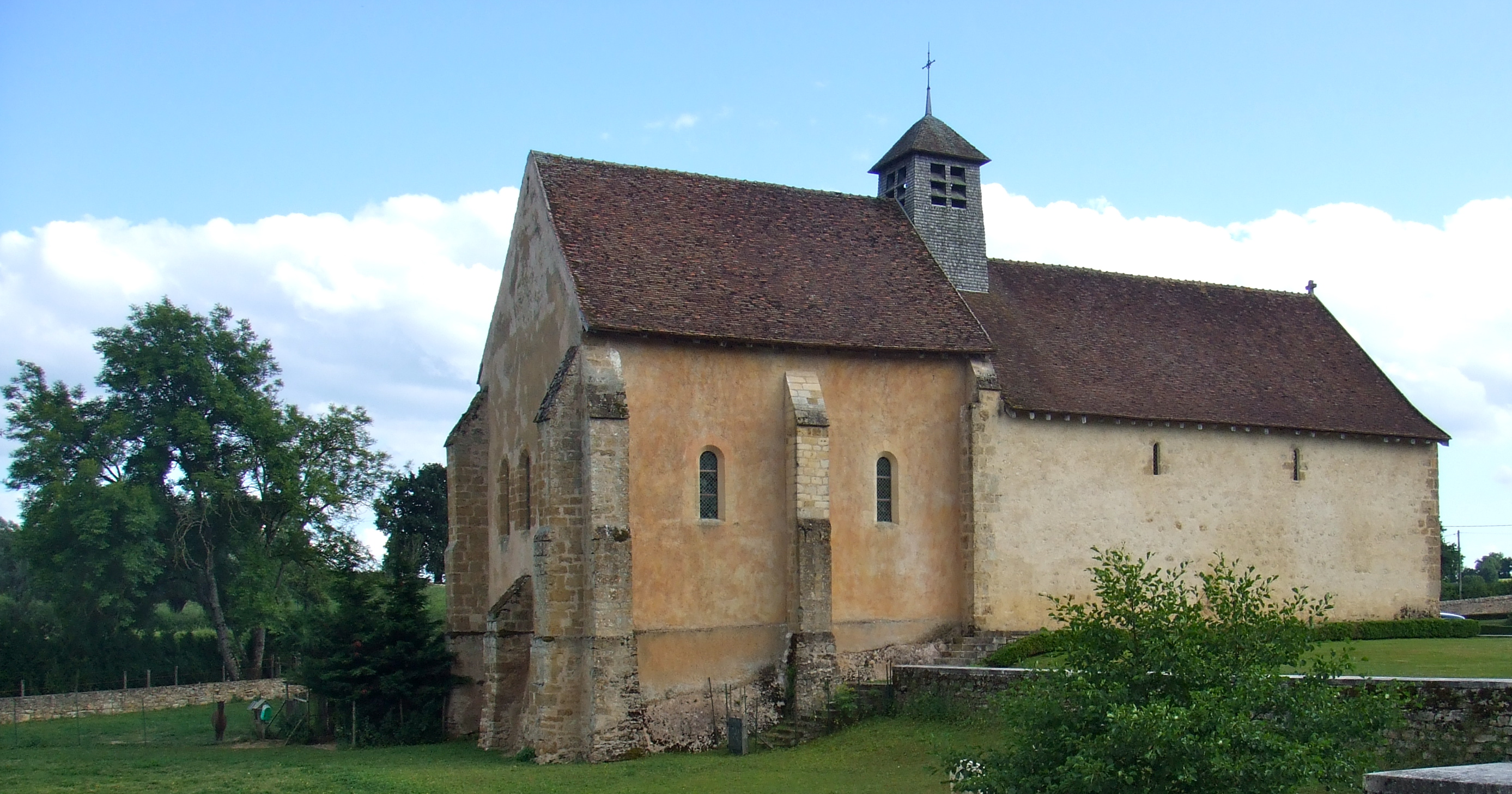 Ancienne église du château d'Anizy, Limanton, Nièvre .